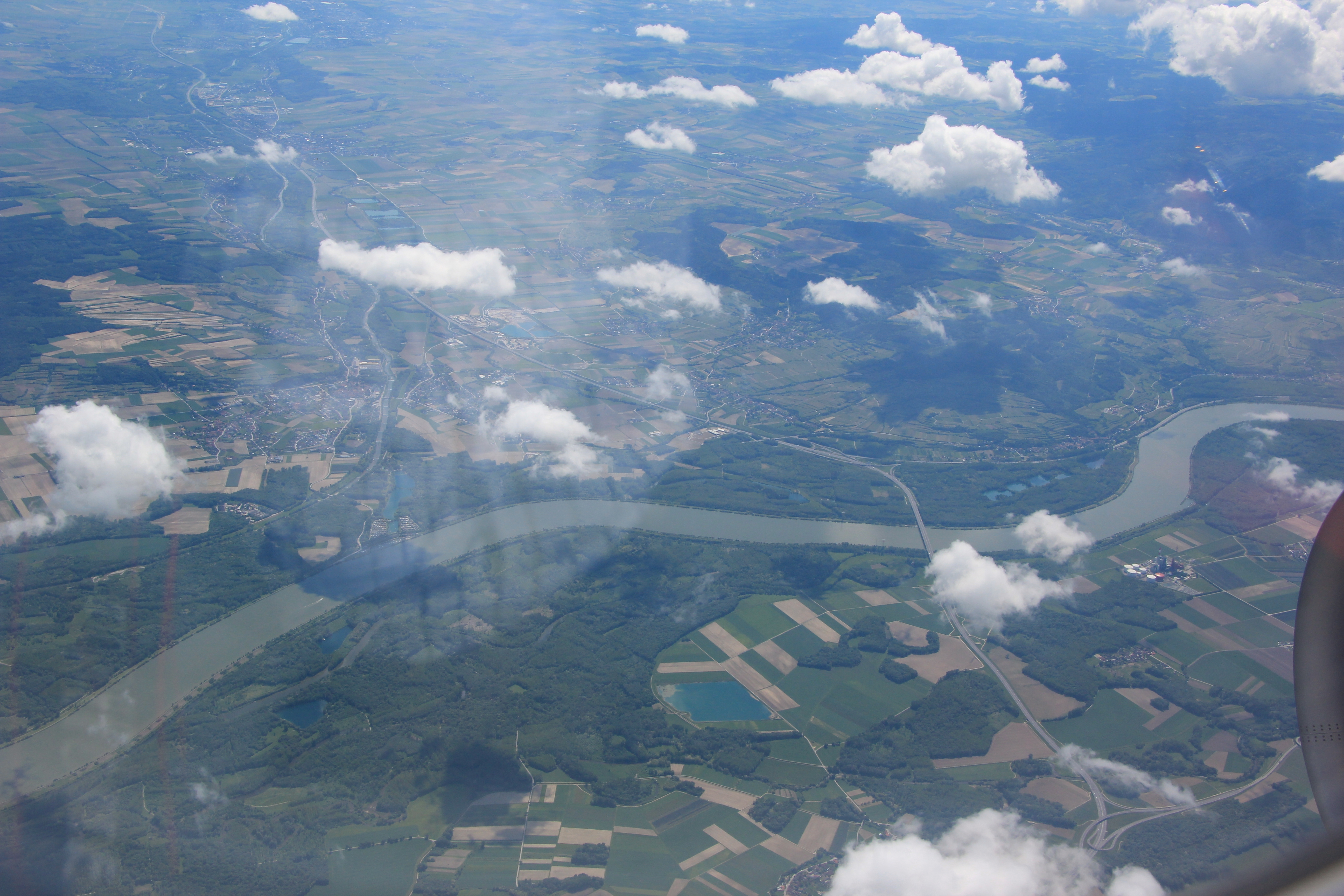 Georgsbrücke bei Traismauer über die Donau